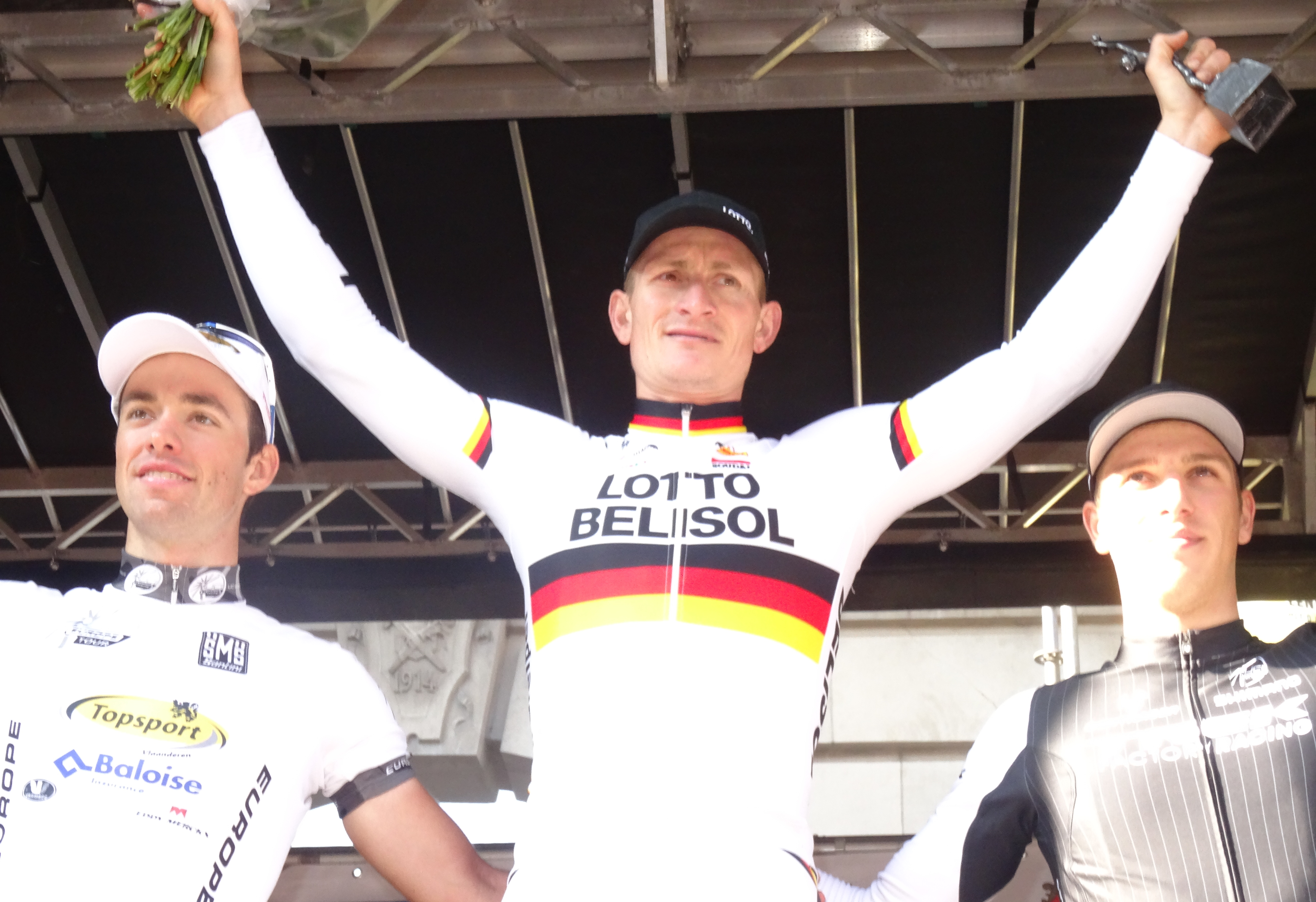 Reportage photographique réalisé le dimanche 14 septembre à l'occasion du départ et de l'arrivée du Grand Prix Jef Scherens 2014 à Louvain, Belgique.